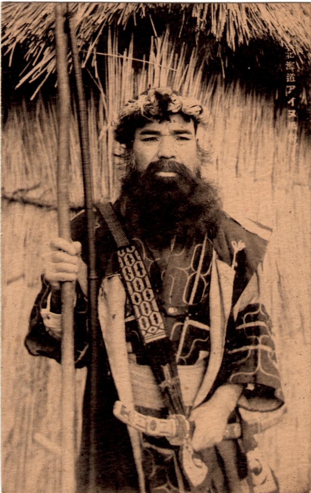 戦前の絵葉書より